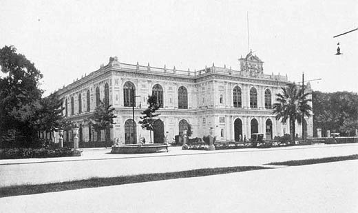 Lima Museum of Art (former Palacio de la Exposición).